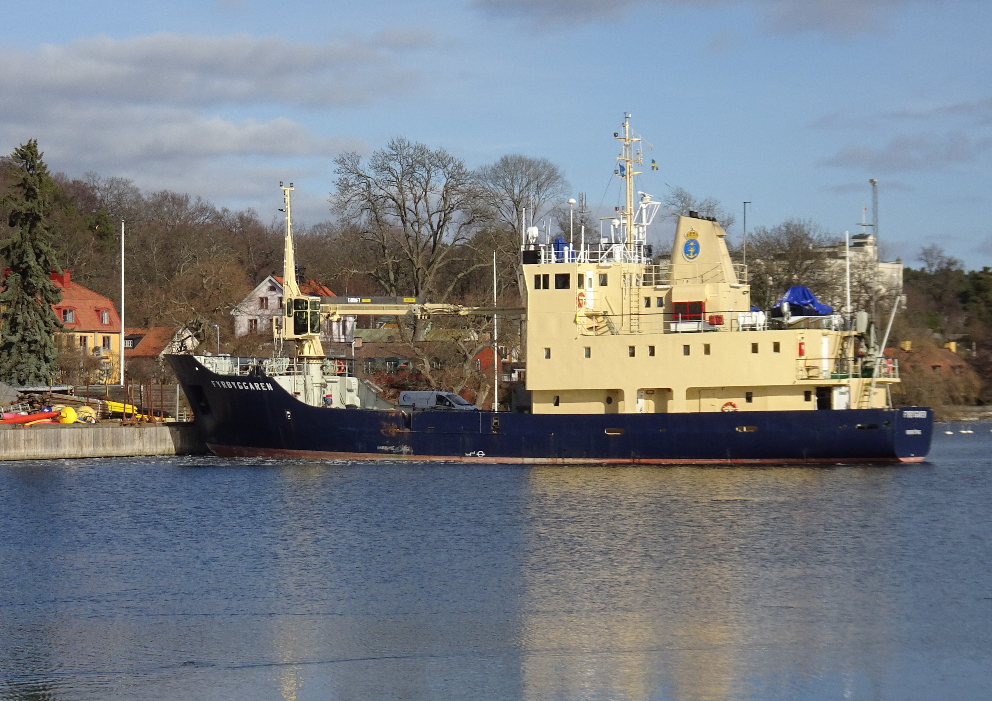 M/S Fyrbyggaren utanför Sjöfartsverkets anläggning på Alberget